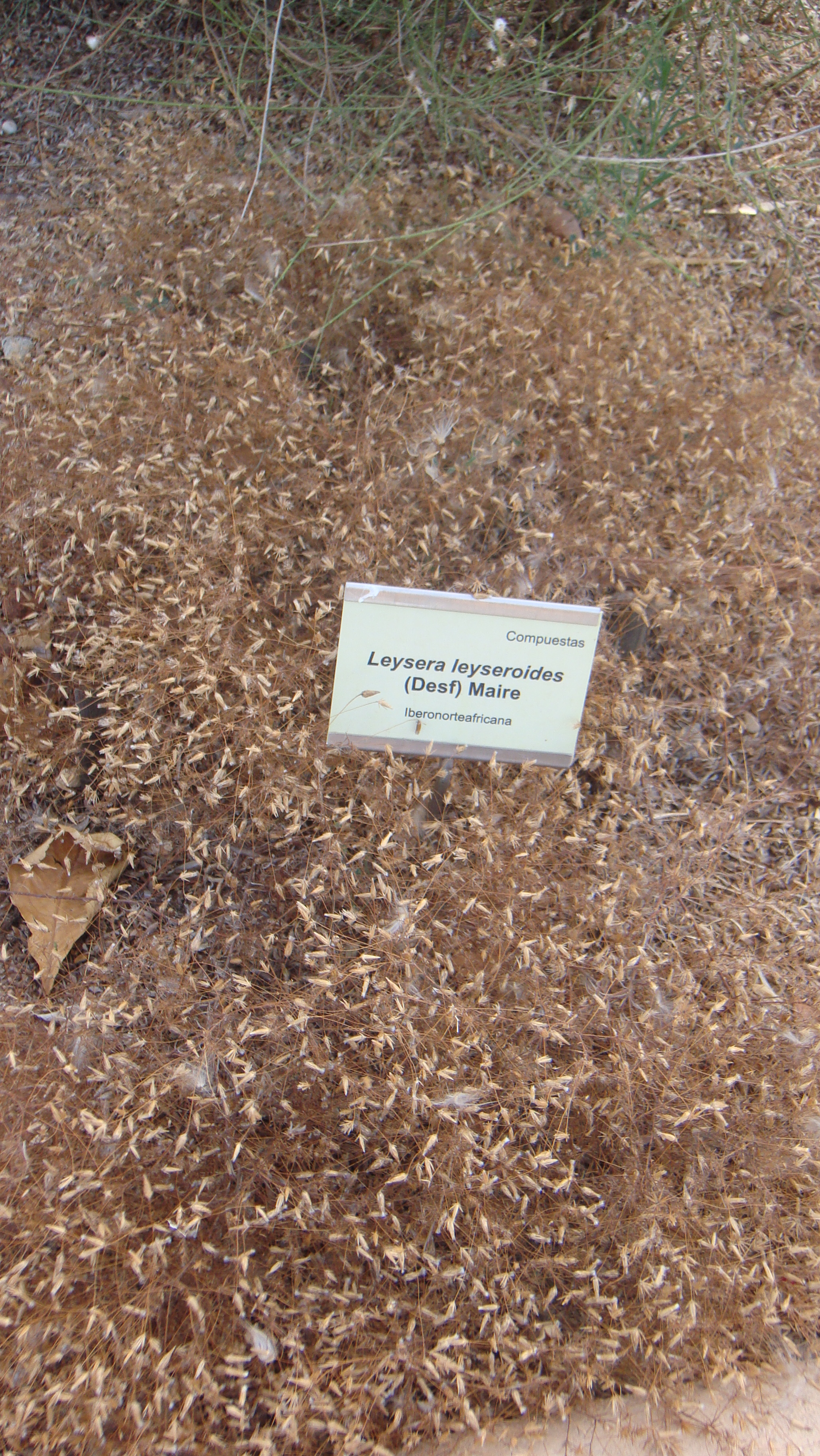 planta en el Jardín Botánico del Albardinal de Rodalquilar, en Nijar, provincia de Almería (España). Se encuentra dentro del Parque natural del Cabo de Gata-Níjar.